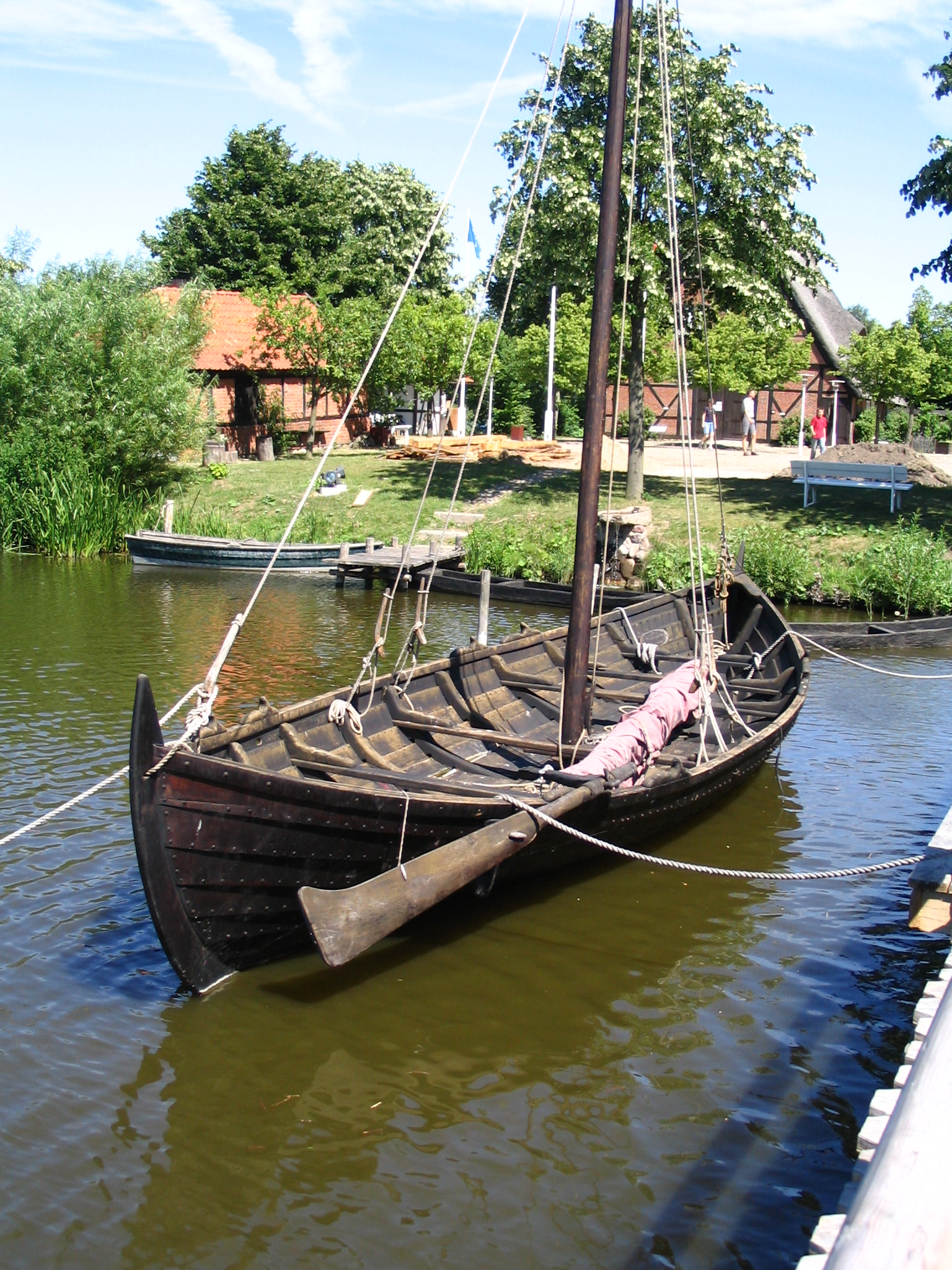 Nachbau eines Handelsschiffes aus der Slavenzeit im Wallmuseum, Oldenburg in Holstein